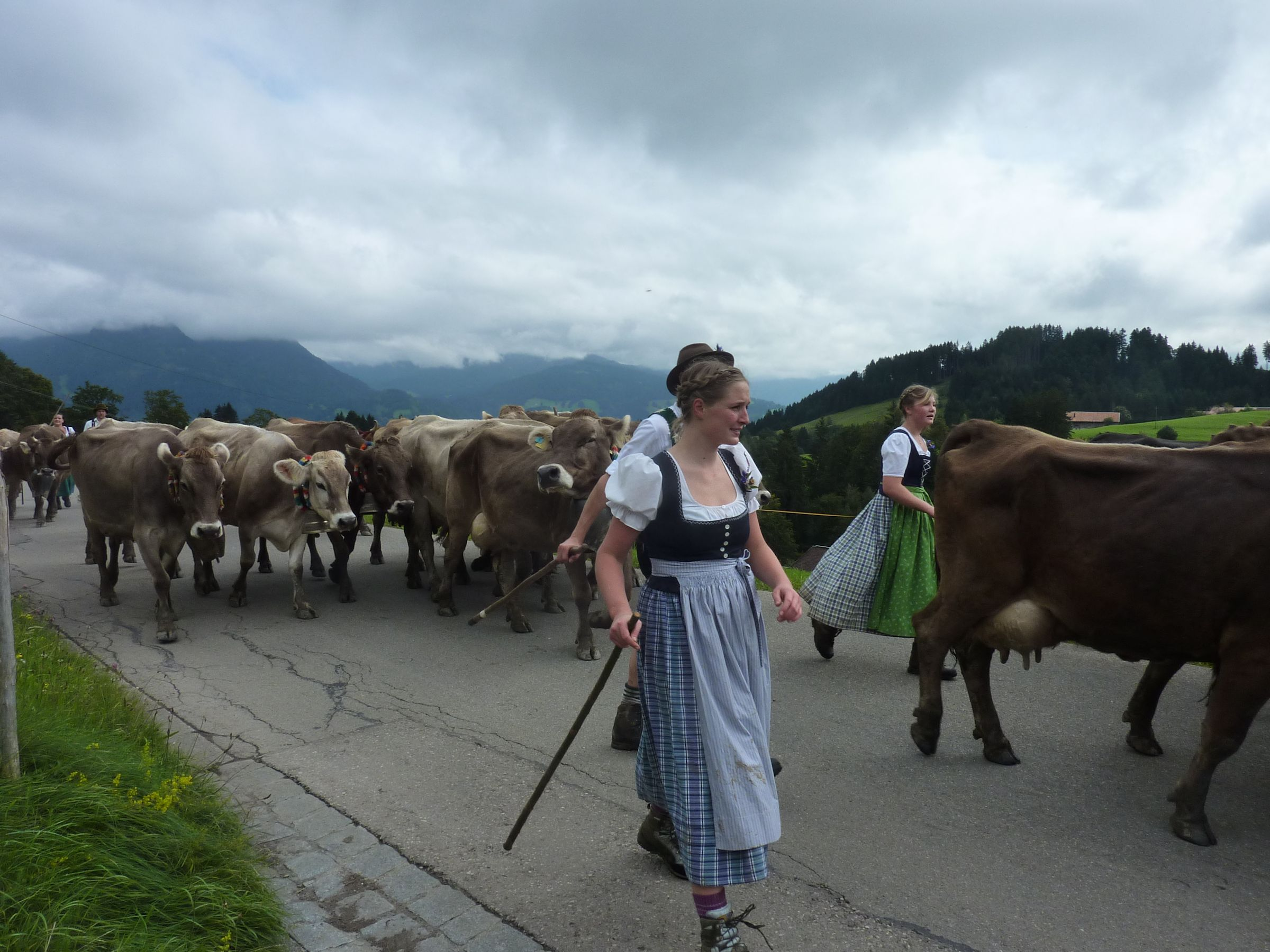 Viehscheid im Gunzesrieder Tal